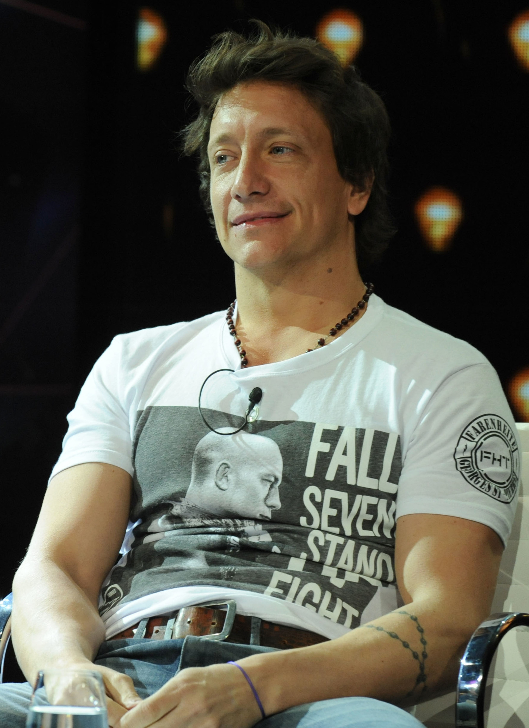 Nicolás Vázquez en Línea de tiempo. 11. 09. 2014.